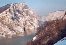 IJzeren Poort